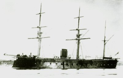 SMS Friedrich Carl war eine Panzerfregatte der Marine des Norddeutschen Bundes und später der Kaiserlichen Marine. Gebaut 1867. Abgebrochen 1905